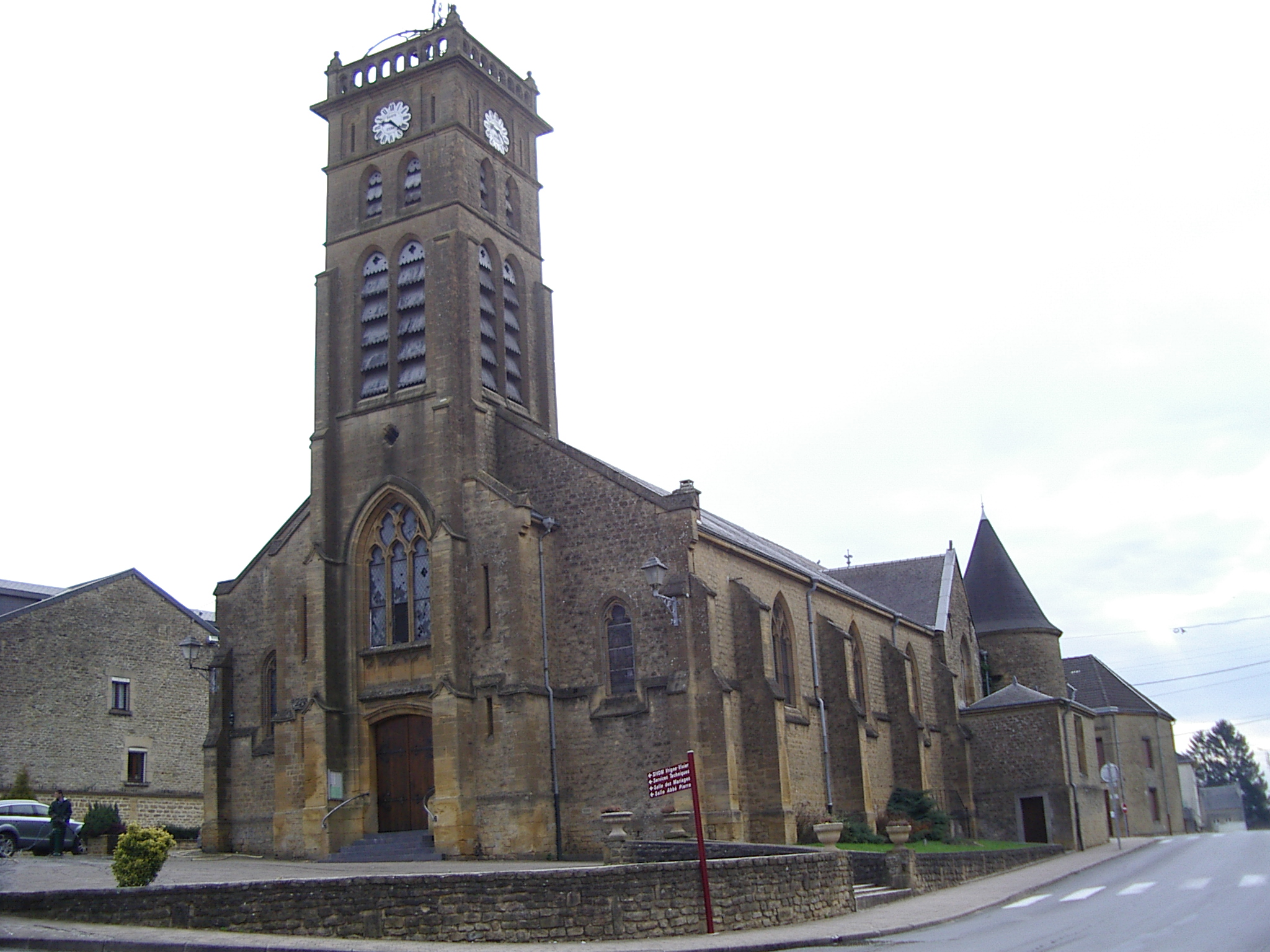 Eglise fortifiée (façade)-Vivier-au-Court-Ardennes-France